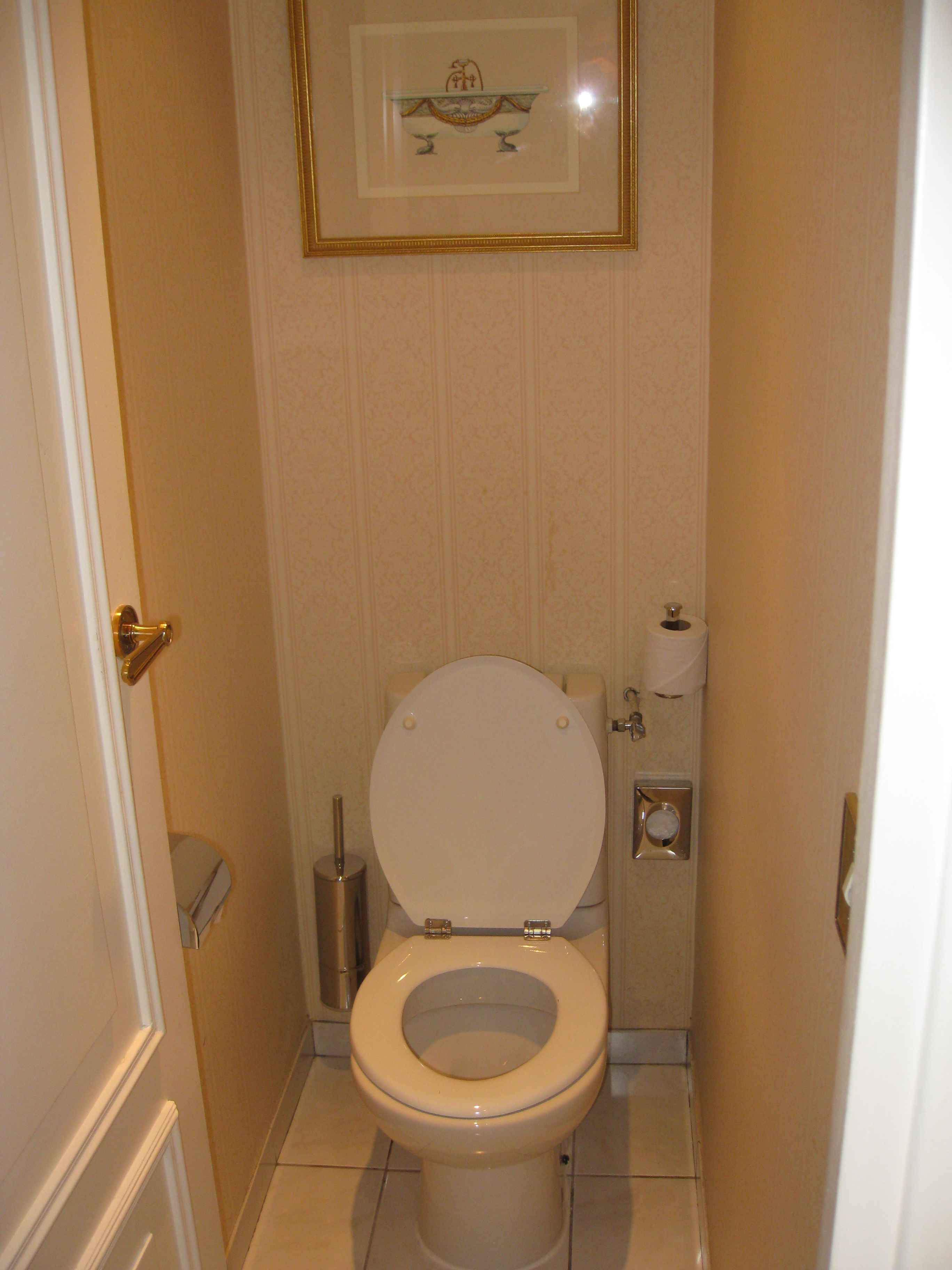 Sofitel Arc de Triomphe מלון סופיטל שער הניצחון